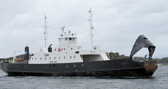 MF Herlaug, ex MF Ulvik, ved Hufthamar hausten 2012.